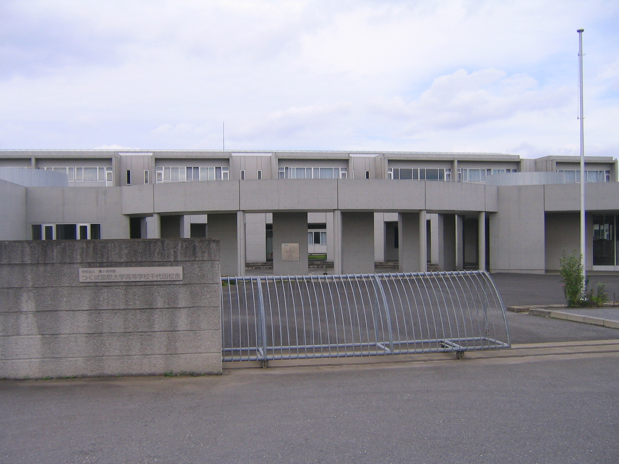 つくば国際大学東風高等学校校舎（2008年10月）